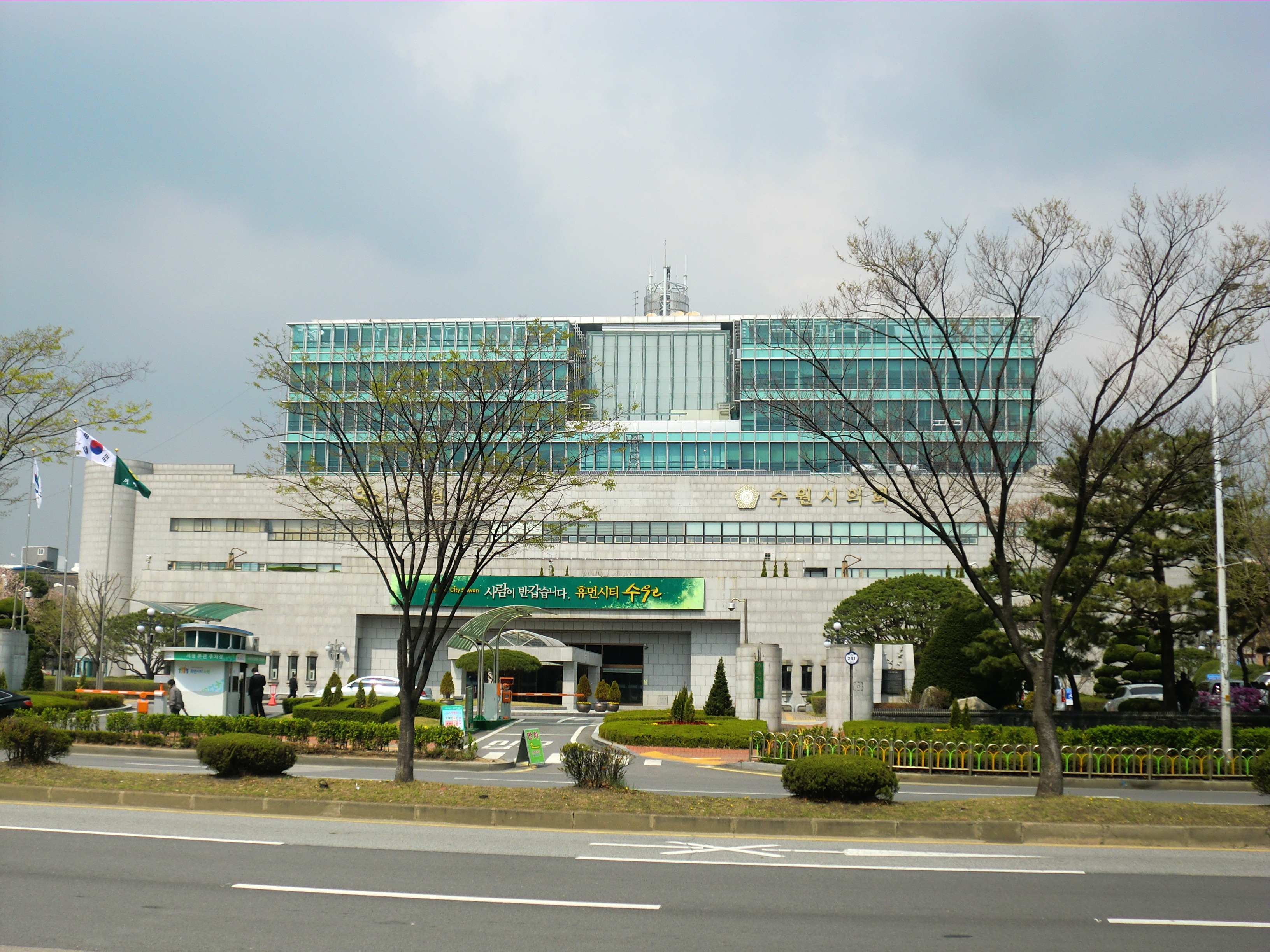 경기도 수원시에 있는 수원시청